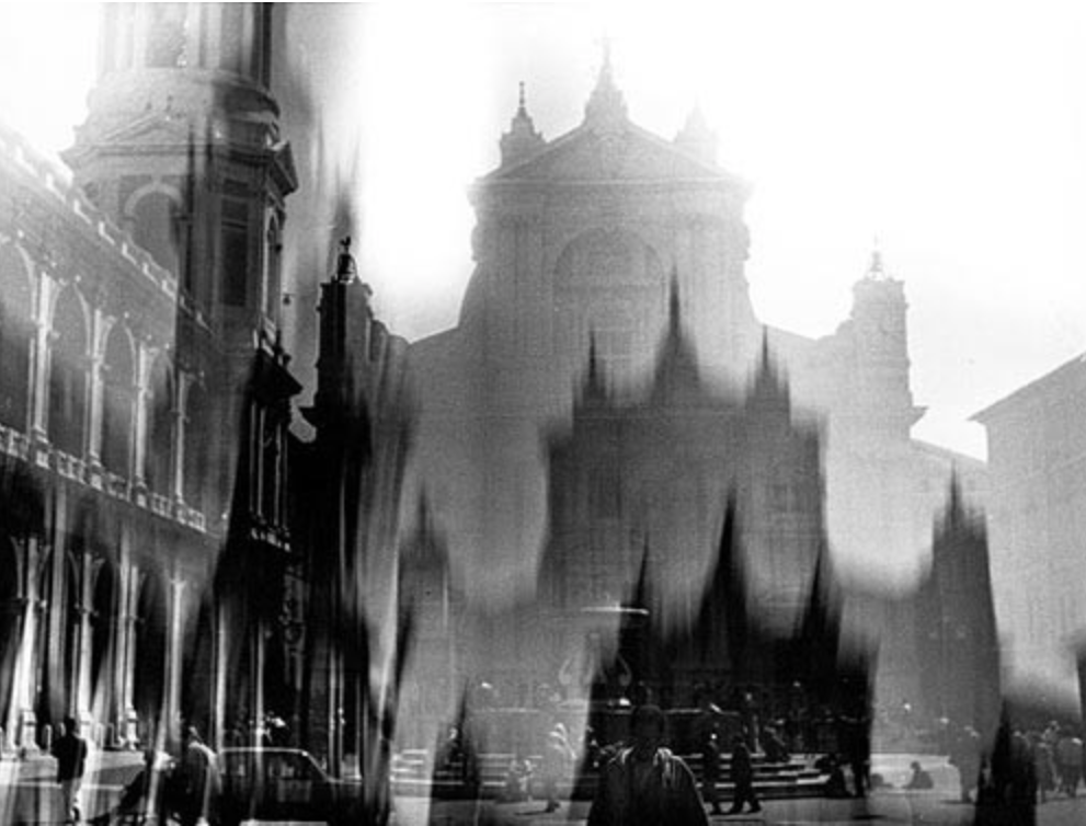 photographie de Mario Giacomelli - Place de la Madonne à Loreto